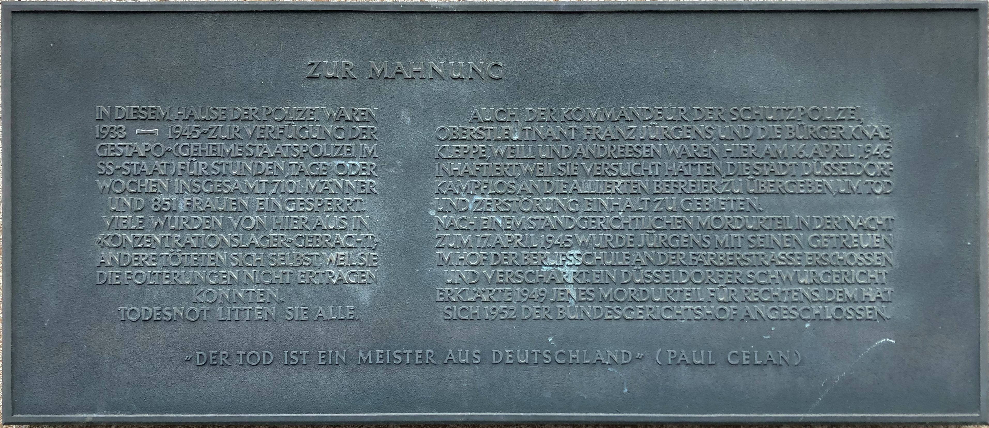 Gedenktafel "Zur Mahnung" am Polizeipräsidium Düsseldorf: In diesem Hause der Polizei waren 1933–1945 "zur Verfügung der GESTAPO" (Geheime Staatspolizei im SS-Staat) für Stunden oder Wochen insgesamt 7101 Männer und 851 Frauen eingesperrt. Viele wurden von hier aus in "Konzentrationslager" gebracht, andere töteten sich selbst, weil sie die Folterungen nicht ertragen konnten. Todesnot litten sie alle. Auch der Kommandeur der Schutzpolizei, Oberstleutnant Franz Jürgens und die Bürger Knab, Kleppe, Weill und Andreesen waren hier am 16. April 1945 inhaftiert, weil sie versucht hatten, die Stadt Düsseldorf kampflos an die Alliierten Befreier zu übergeben, um Tod und Zerstörung Einhalt zu gebieten. Nach einem standgerichtlichen Mordurteil in der Nacht zum 17. April 1945 wurde Jürgens mit seinen Getreuen im Hof der Berufsschule an der Färberstraße erschossen und verscharrt. Ein Düsseldorfer Schwurgericht erklärte 1949 jenes Mordurteil für rechtens. Dem hat sich 1952 der Bundesgerichtshof angeschlossen. "Der Tod ist ein Meister aus Deutschland" (Paul Celan)